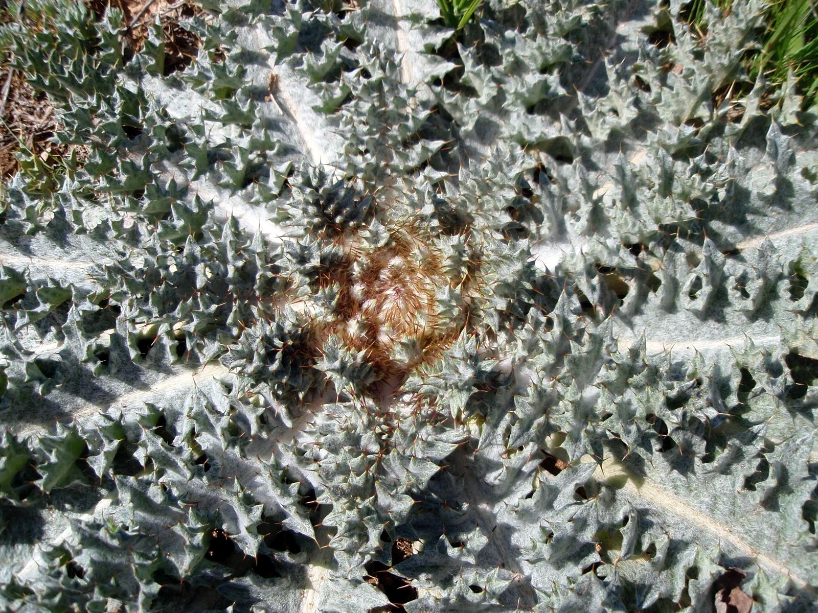 Onopordum acaulon (Cardo blanco sentado) - Vista cenital en pre-antesis. - Les Molines, Banyeres de Mariola (Alicante, España).